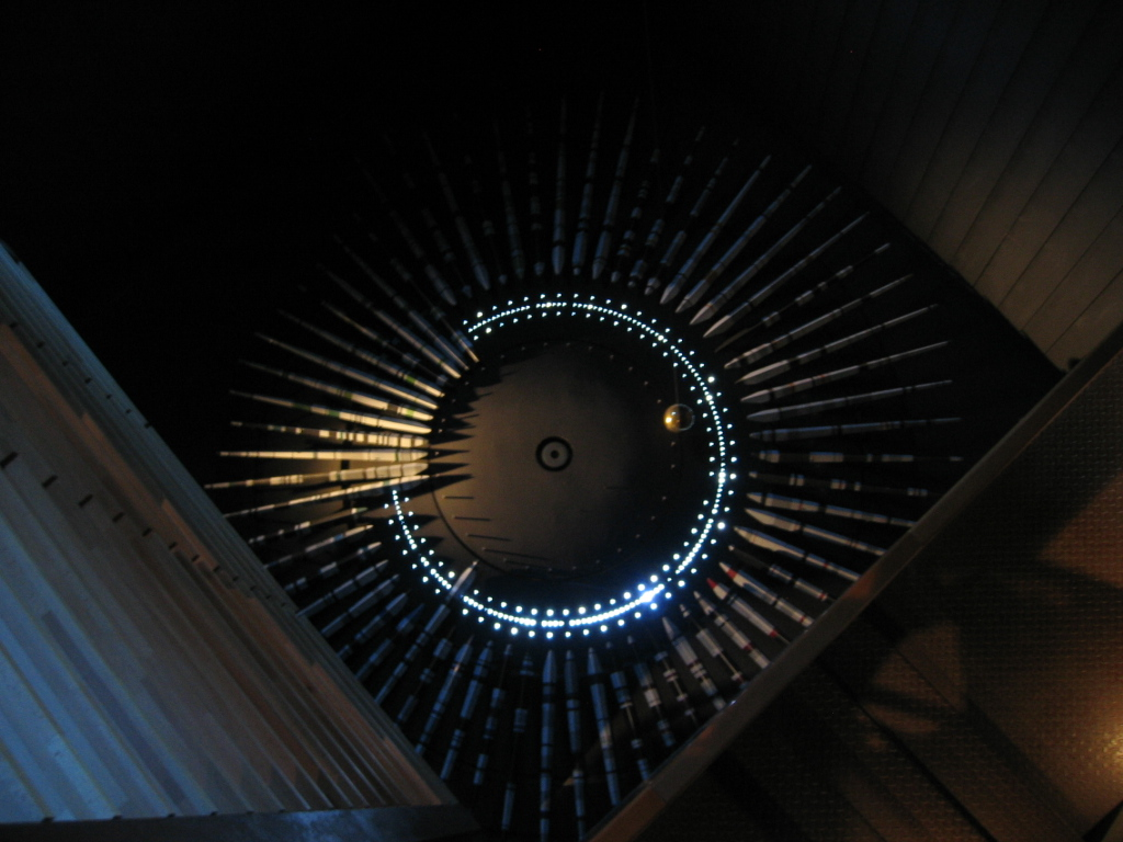 Musée du Temps de Besançon - Franche Comté - France